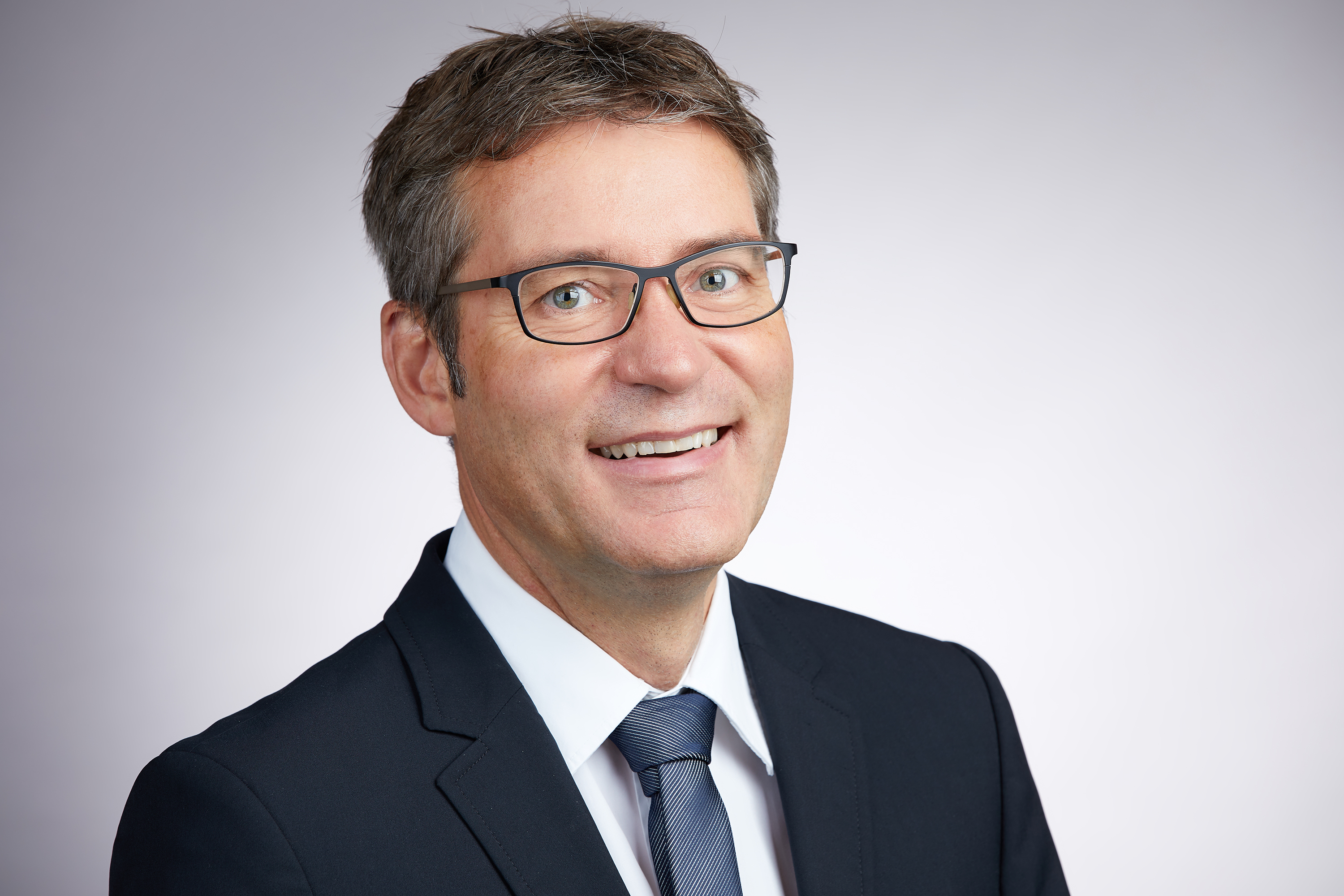 © Foto: UKR